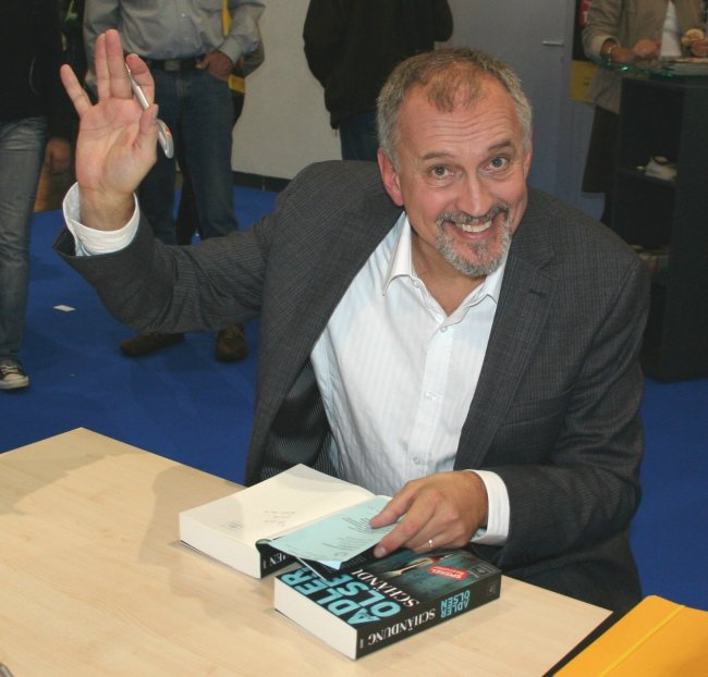 Schriftsteller Jussi Adler-Olsen auf der Frankfurter Buchmesse